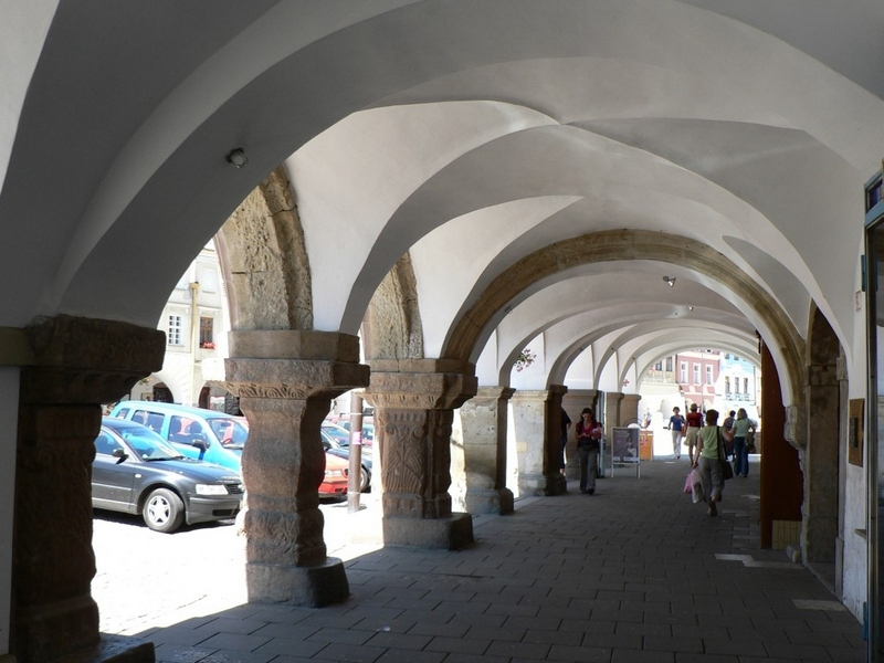 Podloubí na Smetanově náměstí, renesanční Dům U Rytířů (č. p. 110).